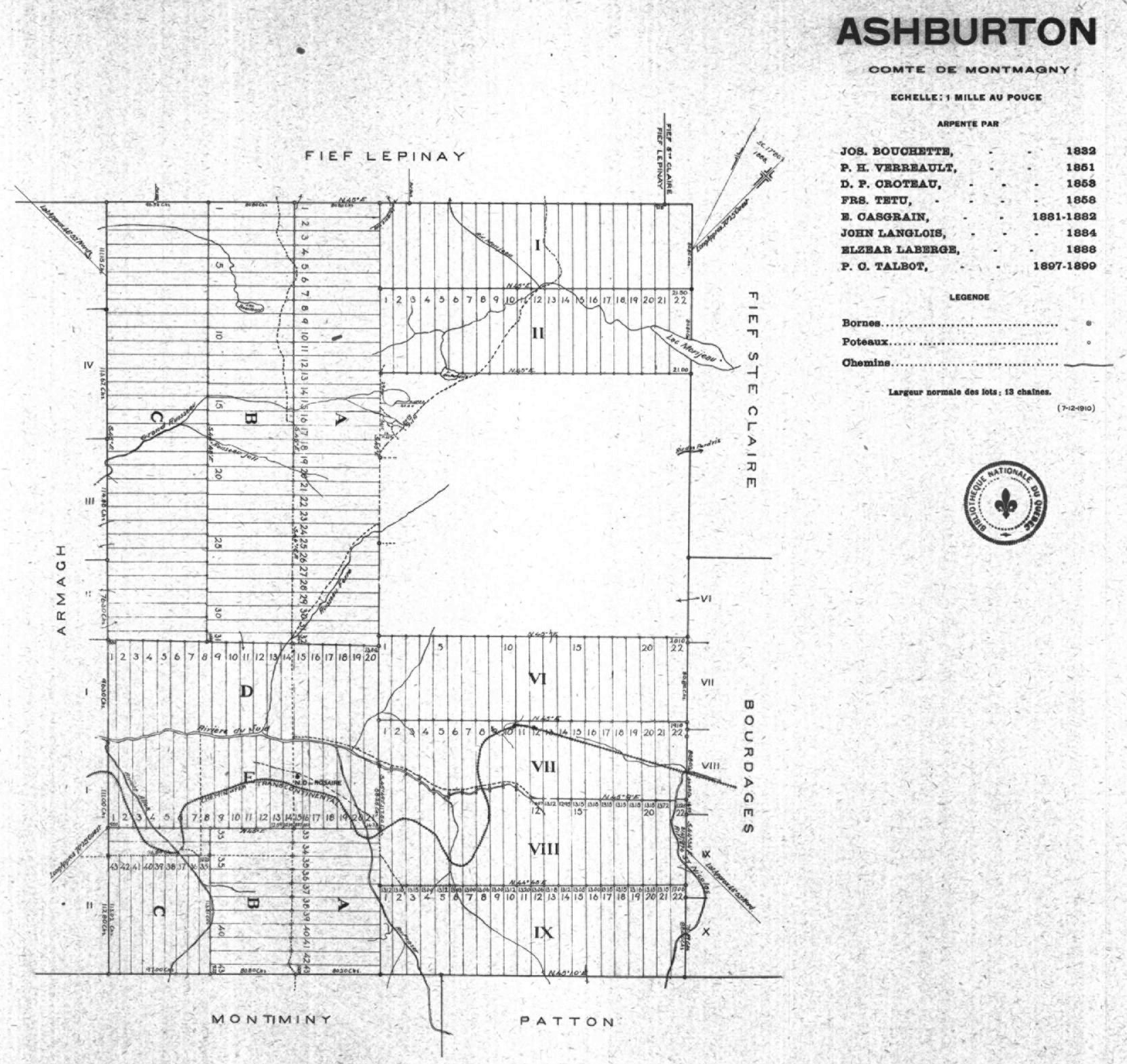 Cartes cadastrales de cantons du Québec, avec indication du nom des arpenteurs Comté de Montmagny Ashburton, Ashburton